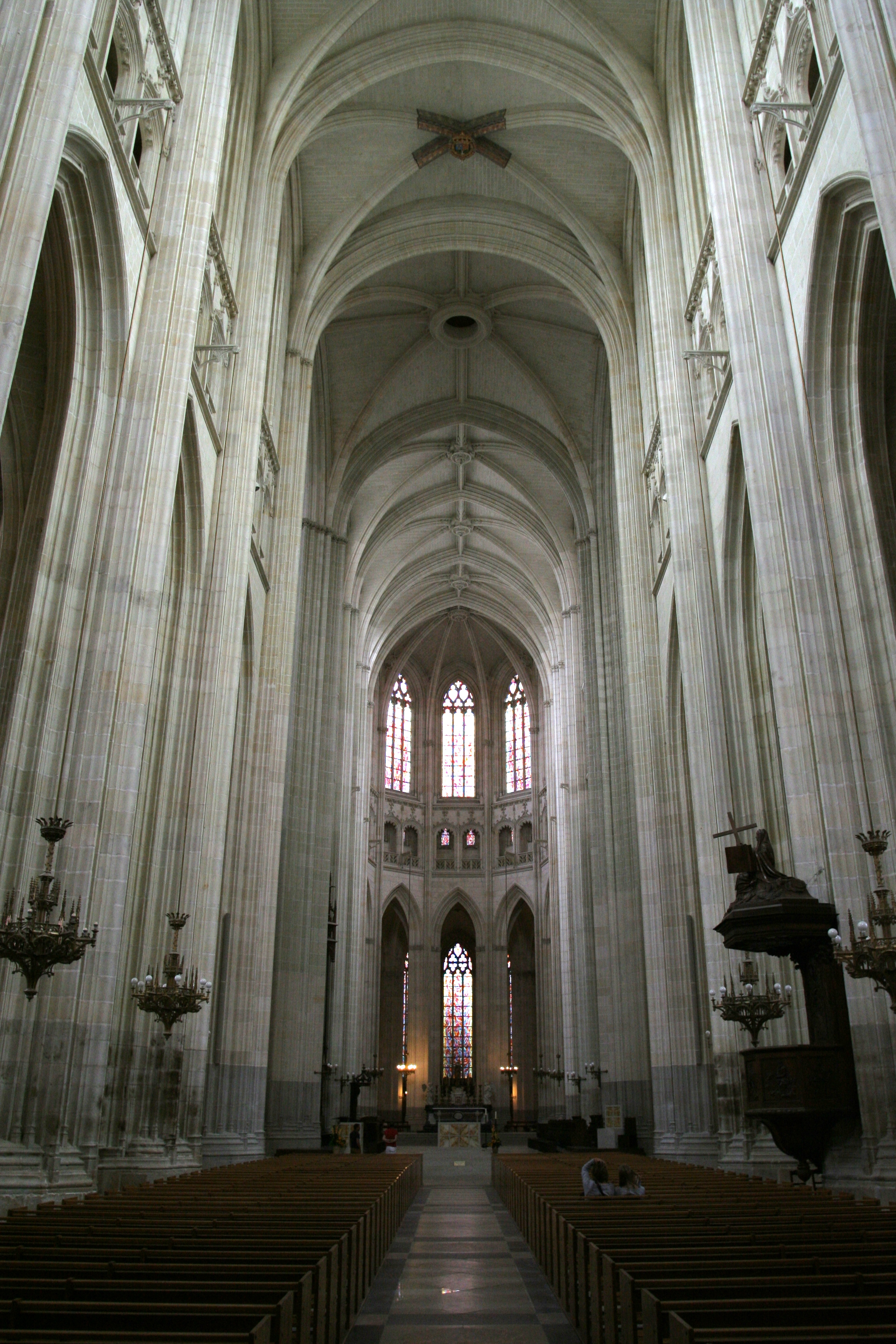 Cathédrale Saint-Pierre-et-Saint-Paul de Nantes.